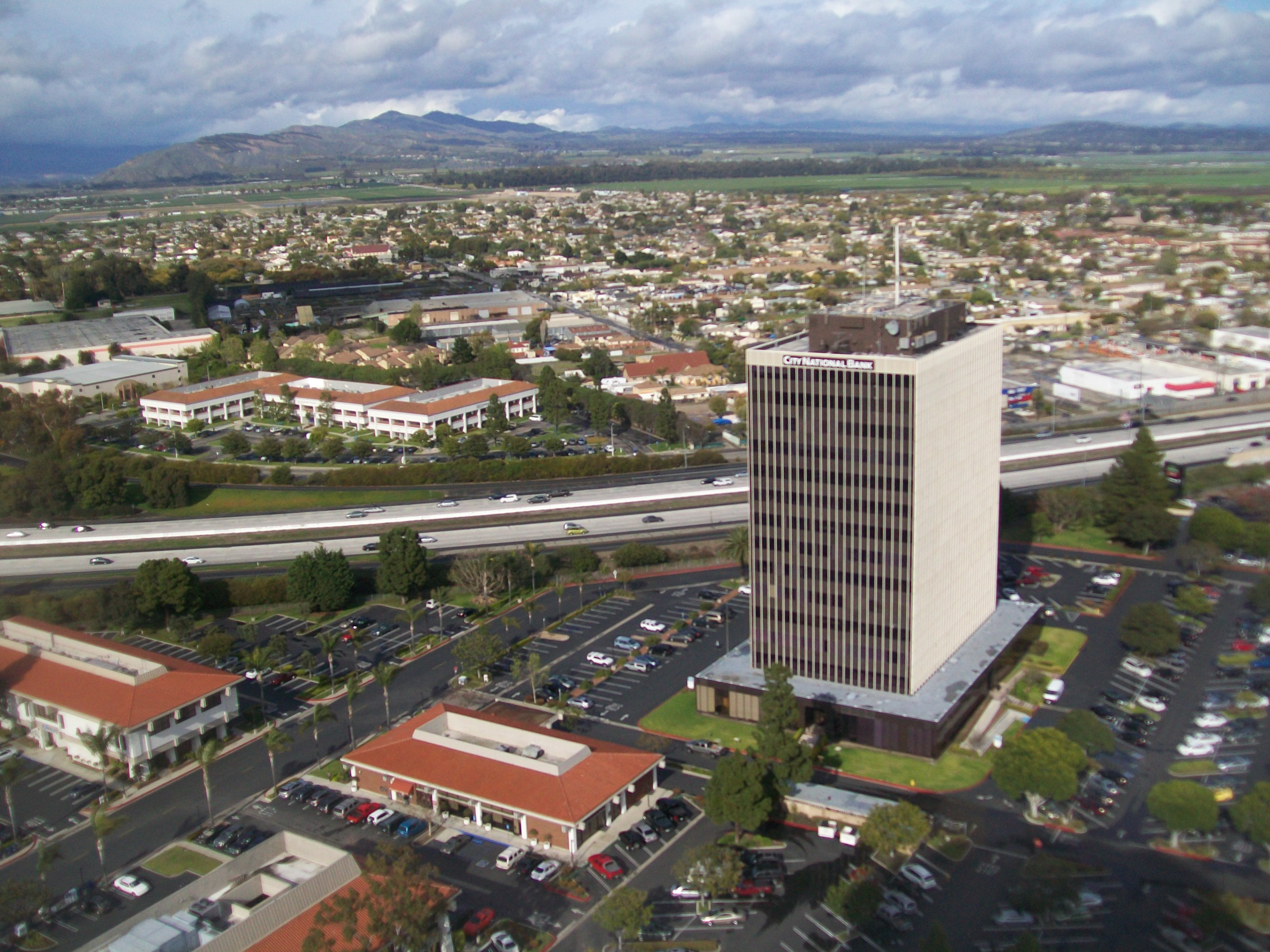 Rio Lindo, Oxnard, CA 93036, USA